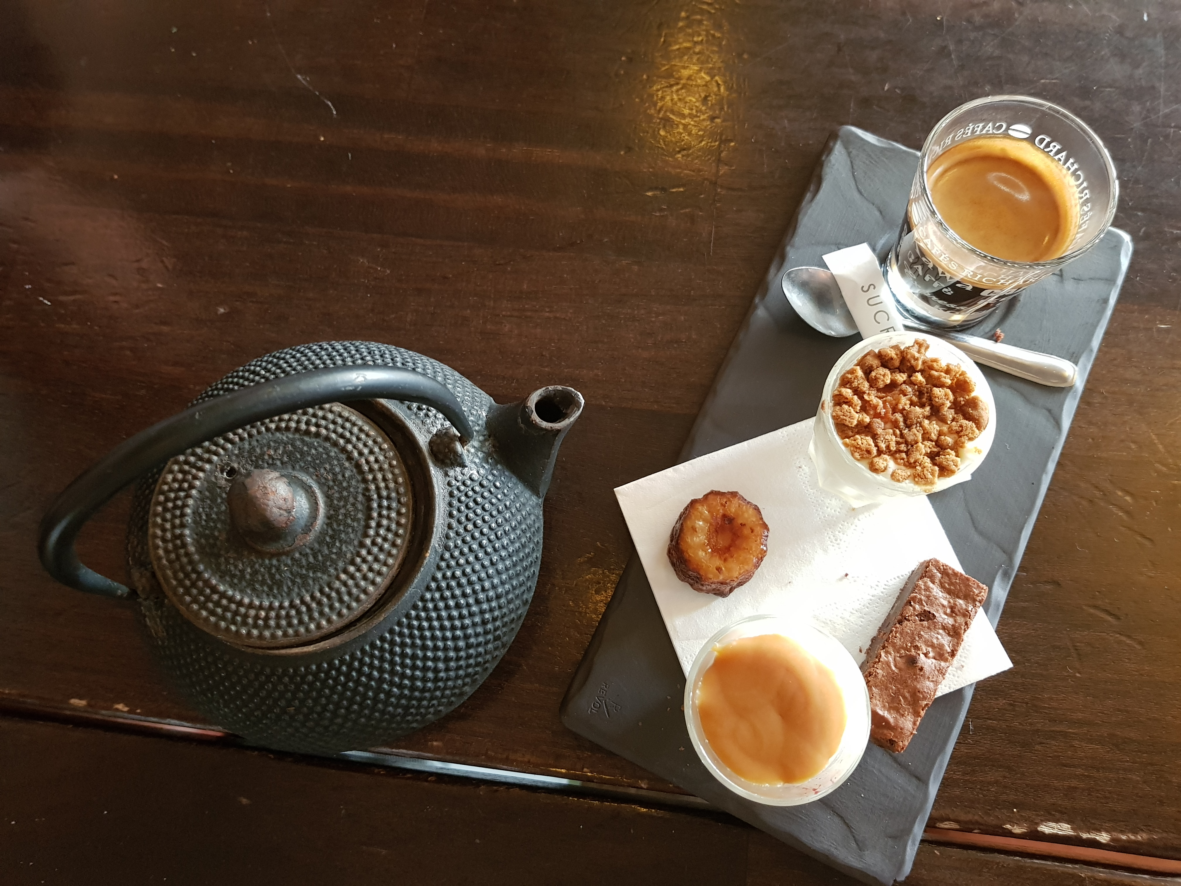 thé gourmand en dessert du Prétexte, brasserie parisienne a côté de la bibliothèque Marguerite Durand